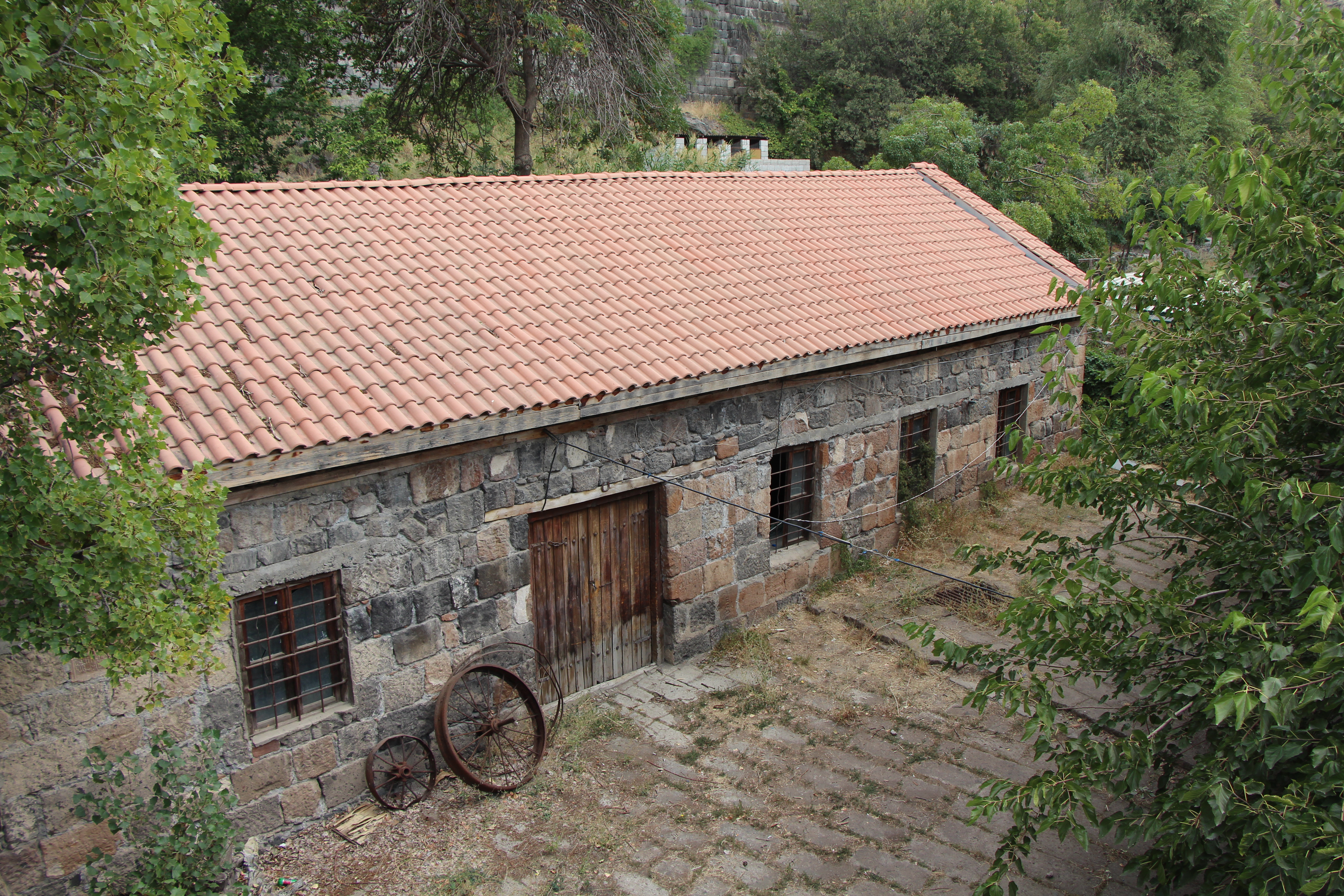 Աշտարակ, Արագածոտնի մարզ, ՋՐԱՂԱՑՆԵՐԻ ՀԱՄԱԼԻՐ 19 դ. վրջ Աբովյան փող., 2 2.1/28 միջնադարյան կամրջի մոտ, վրկնգ.՝ 1983 թ., ճարտ.՝ Գ. Գյուրջյան 1/28